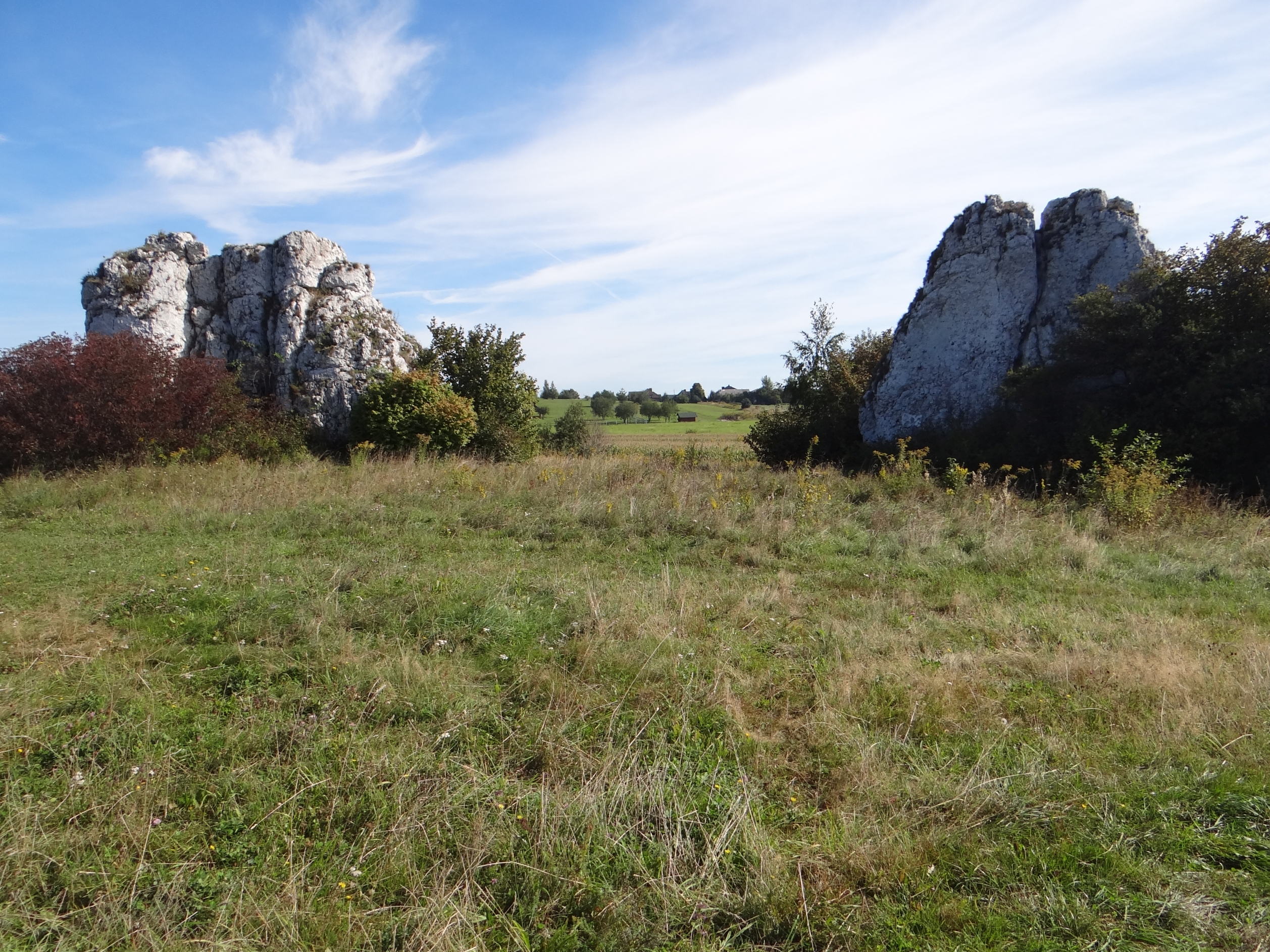 Polna Skałka i Ostry Kamień w grupie skał na wzgórzu 502 (Grodzisko) w Jerzmanowicach